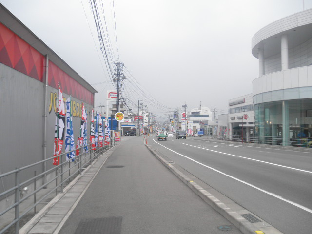 徳島県徳島市論田町和太開 徳島県道120号徳島小松島線